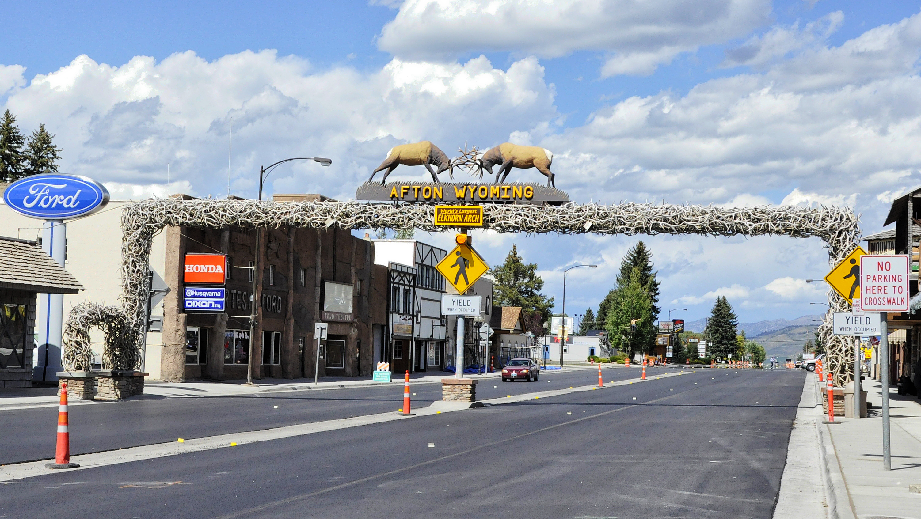 Afton (Wyoming) - de boog over de U.S. Route 89 van 3011 hertengeweien